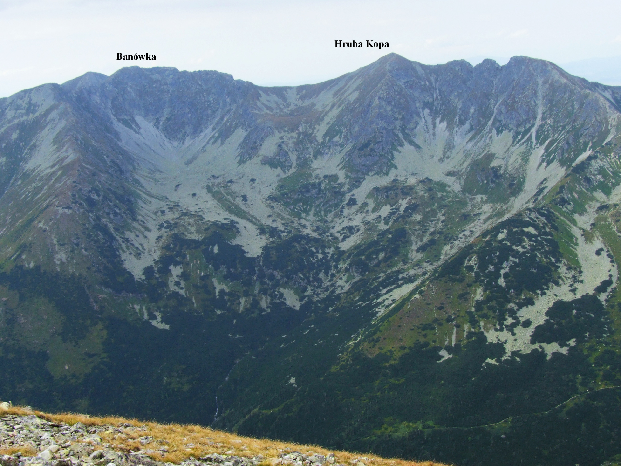 Banówka, Hruba Kopa, Trzy Kopy (West Tatra Mountains)